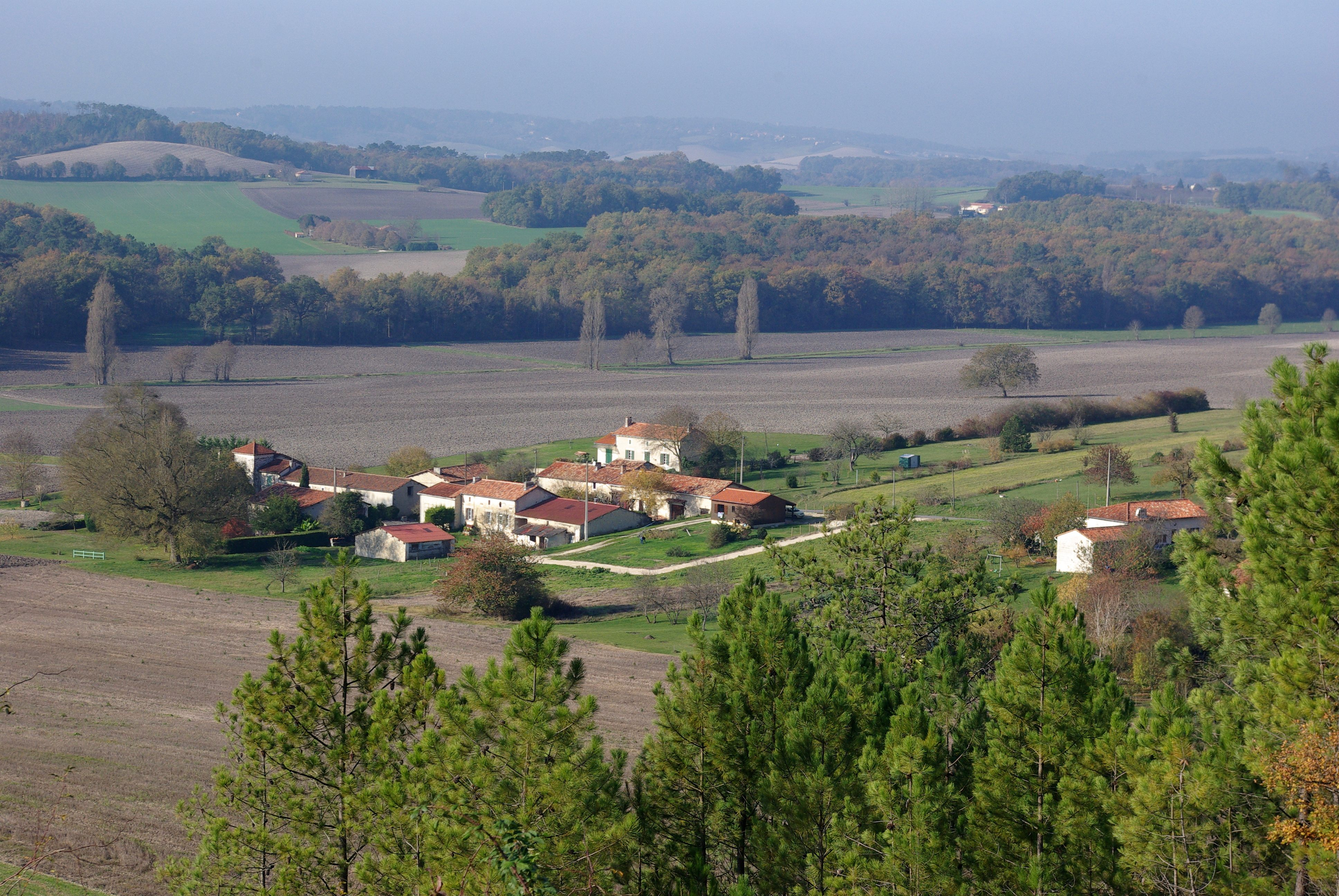 Le lieu-dit Chez Foucaud depuis la D137, commune de Montboyer, Charente, France.